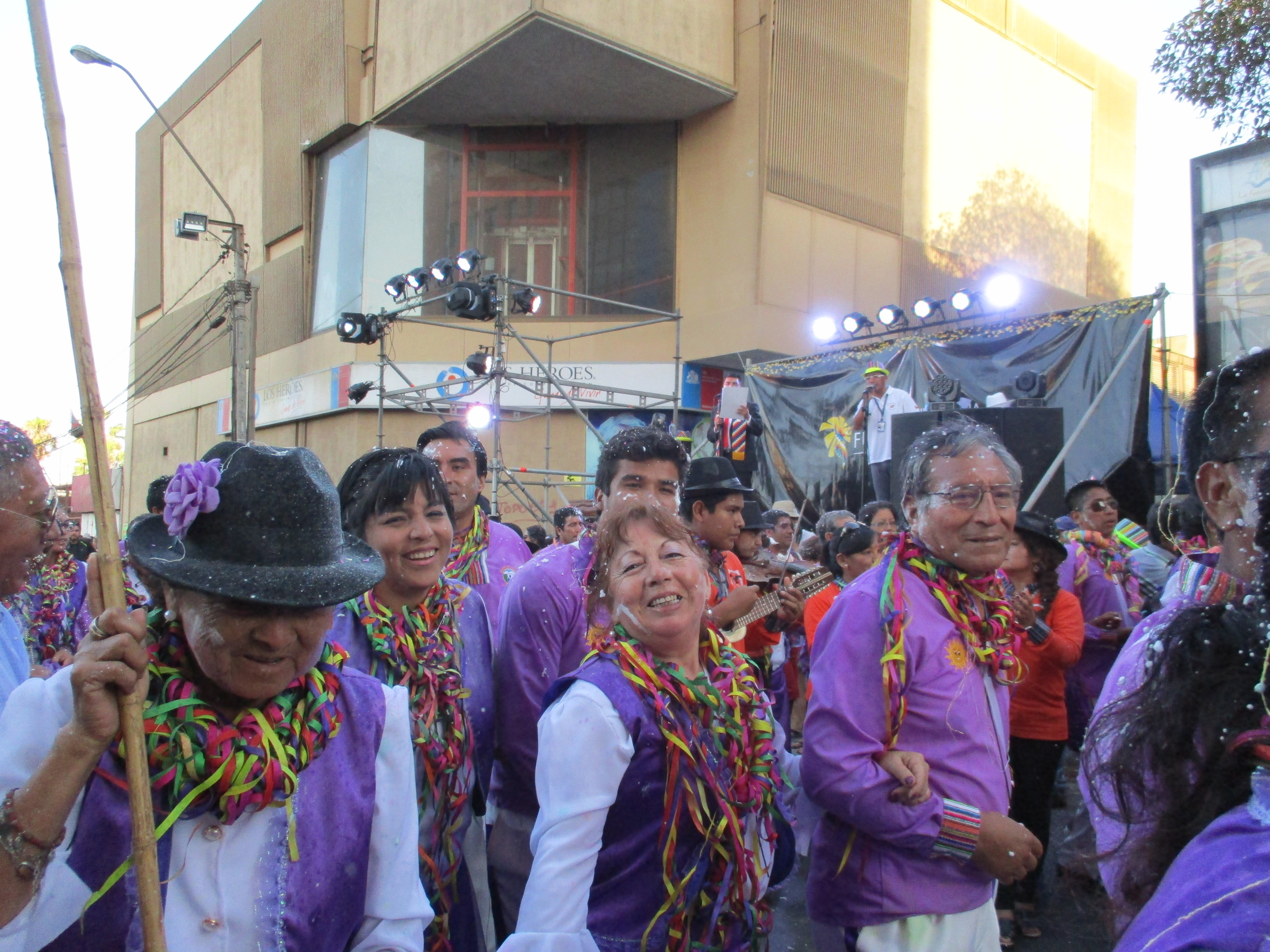 Orquesta de Putre (Carnaval con la Fuerza del Arica 2016)